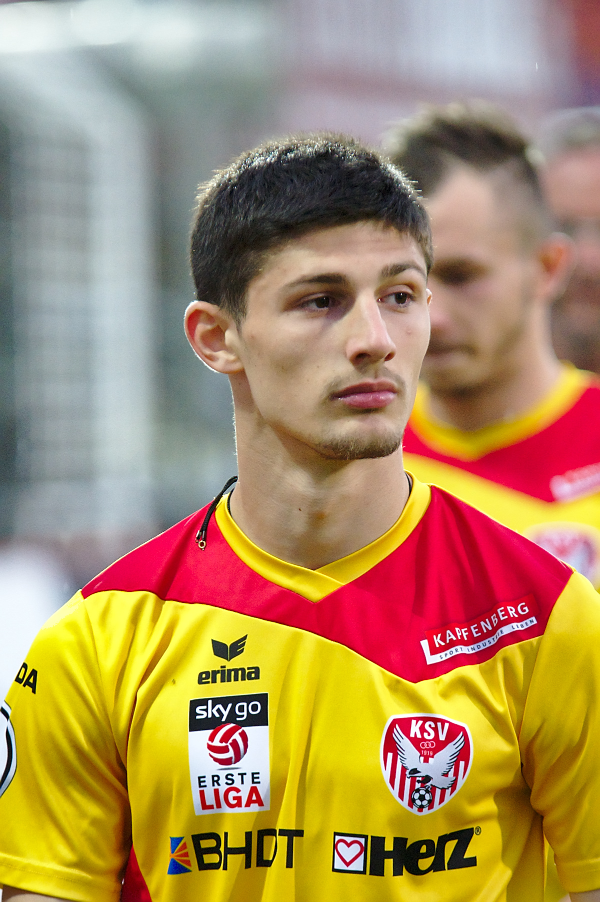 Saisonvorbereitungsspiel Admira Wacker Mödling gegen Kapfenberger SV am 17.6.2017, Bild zeigt: Lewan Eloschwili